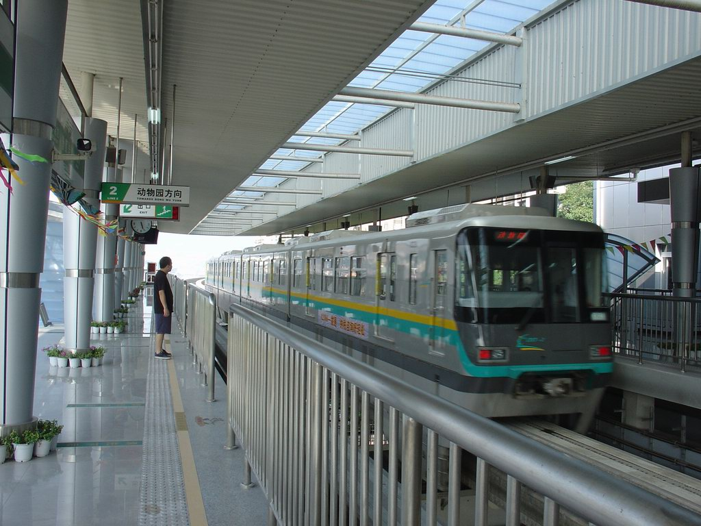 重慶軌道交通二號線楊家坪輕軌站。